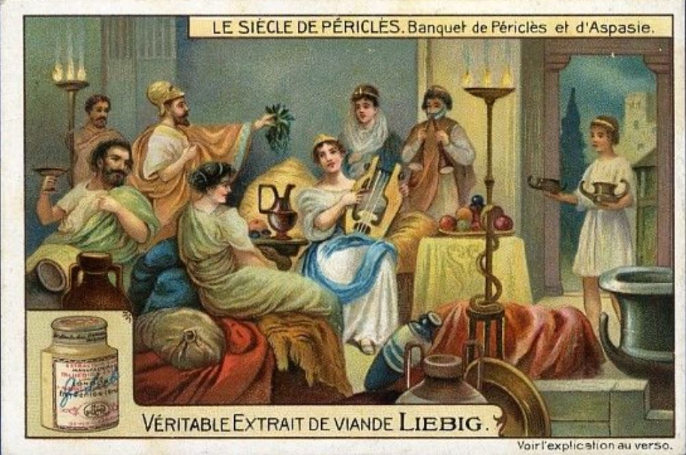 Aspasia